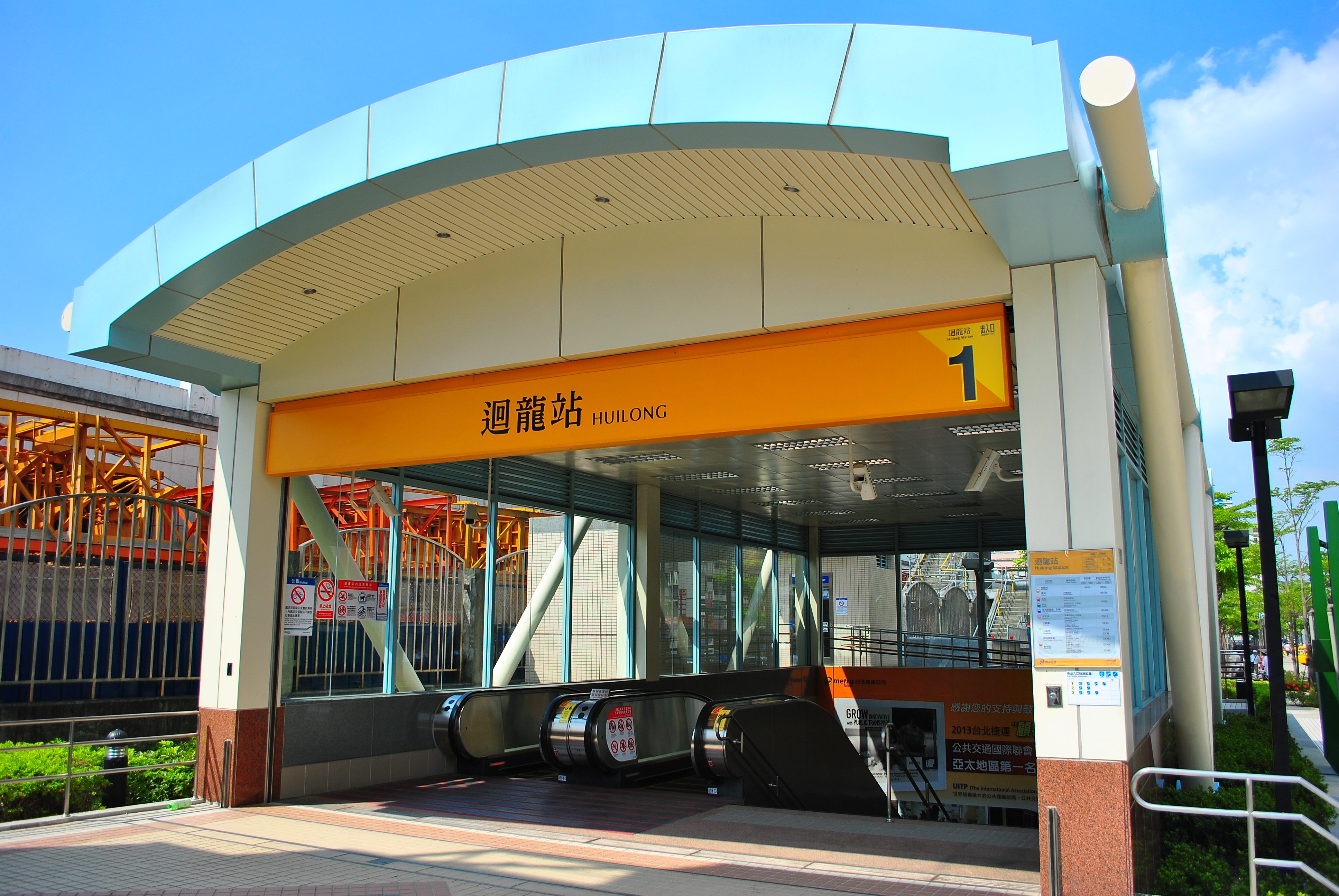 台北捷運迴龍駅の出口1。